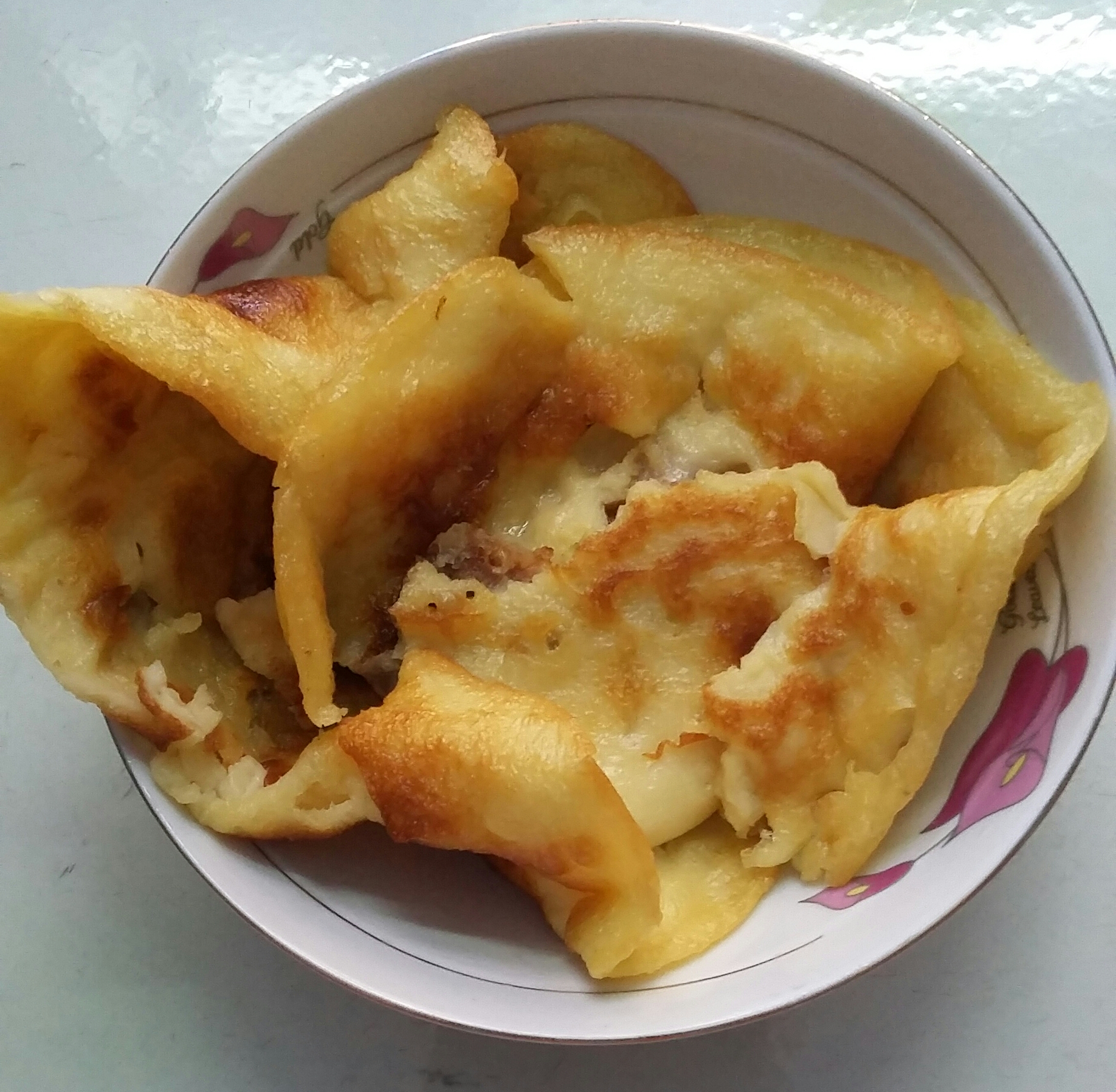 Hình chụp bằng máy ảnh cá nhân